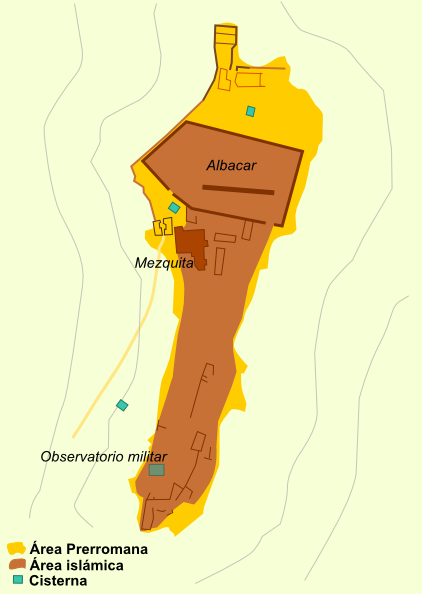 Plànol del jaciment d'El Molón, situat al terme de Camporrobles. Basat en el plànol publicat en esta monografia de la Universitat d'Alacant.